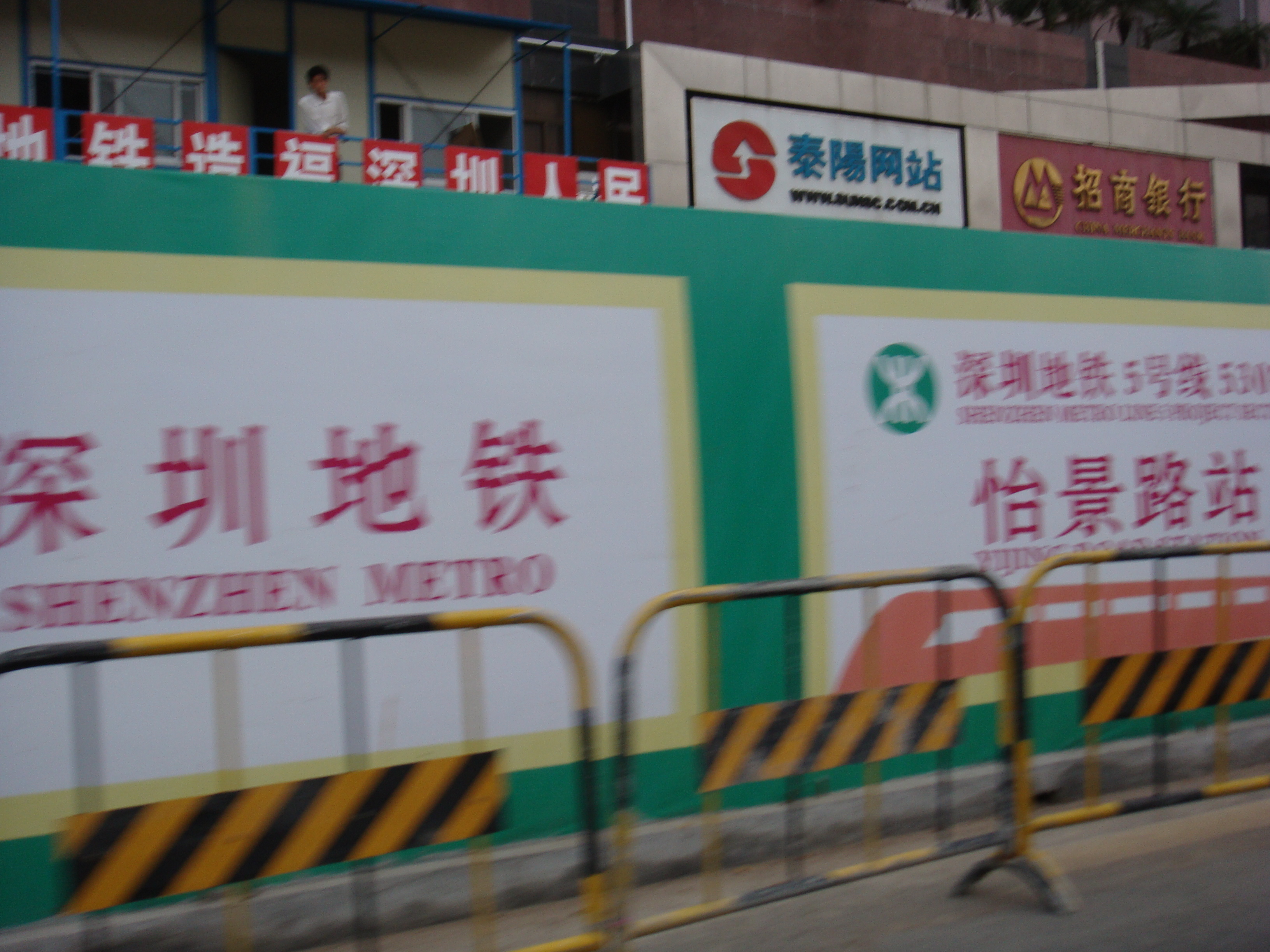 怡景路站